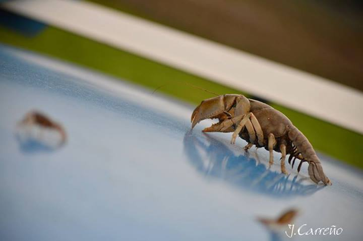 camaron langosta de agua dulce de lado